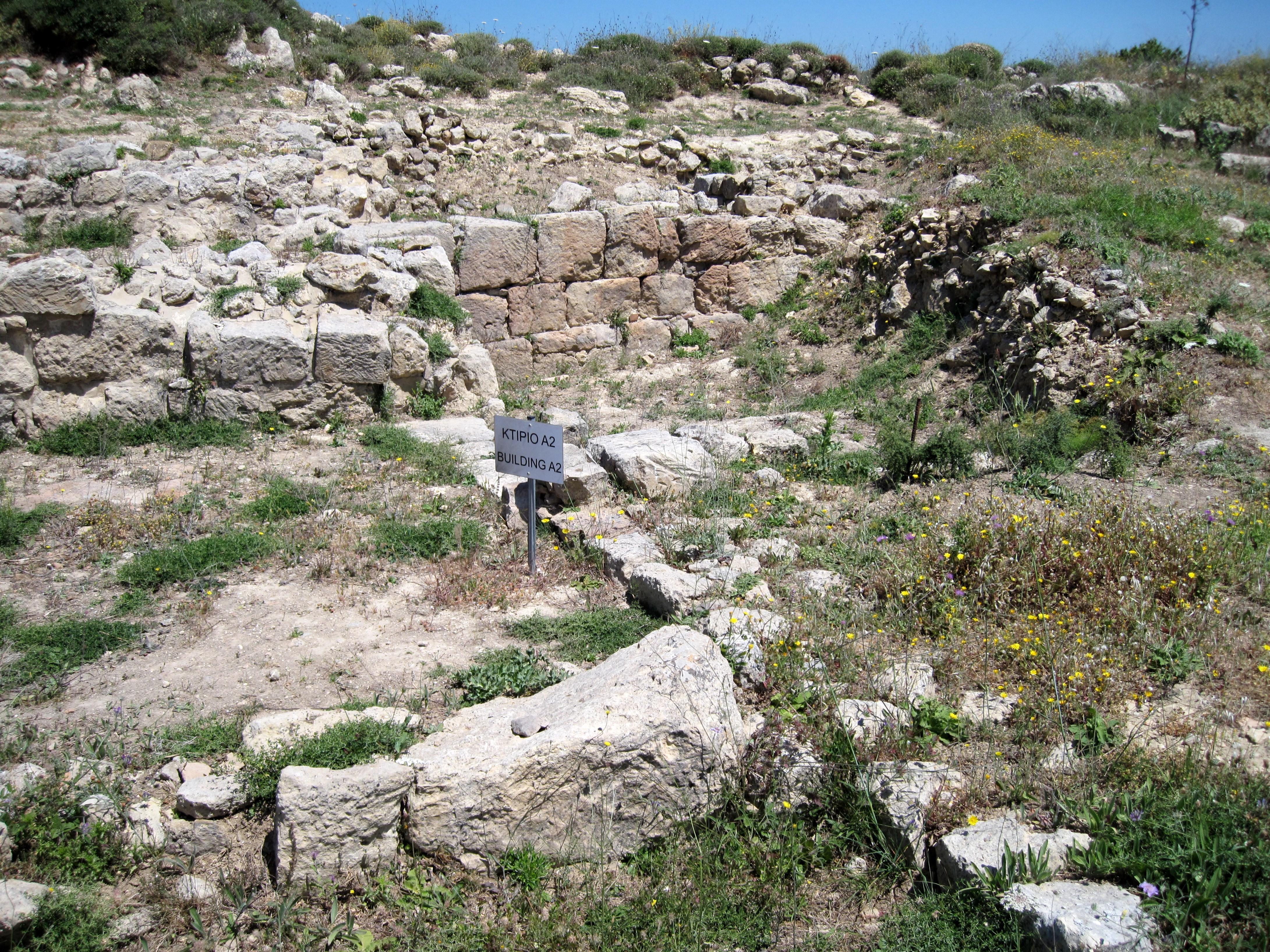 Ausgrabungsstätte der Akropolis der antiken Stadt Sybrita auf dem Hügel Kefala bei Thronos, Gemeinde Syvritos, Präfektur Rethymno, Kreta, Griechenland